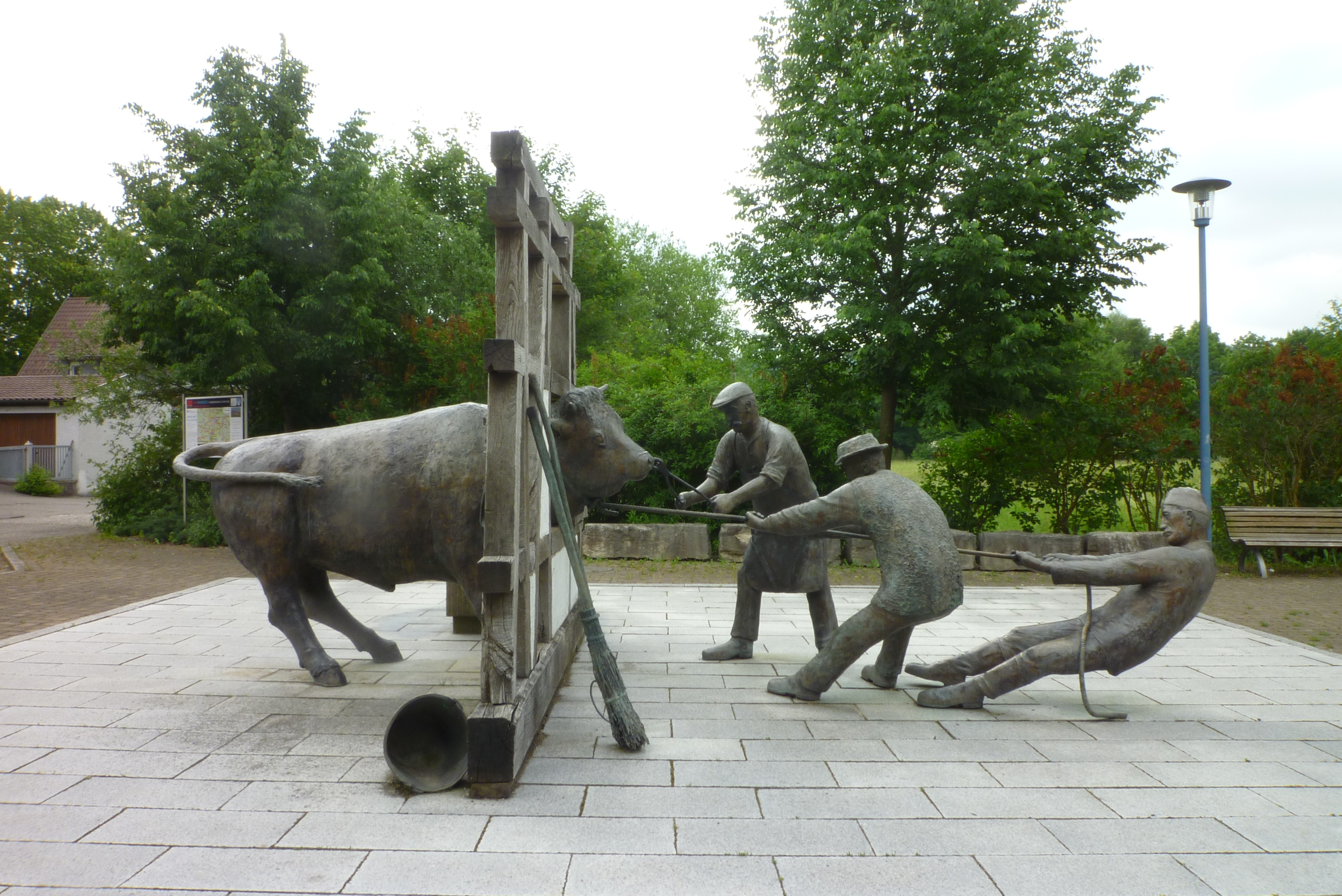 Deißlingen - Skulptur, Hagenverwürger Brunnen